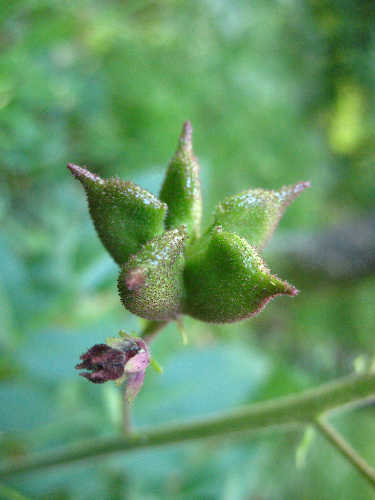 Nagyezerjófű termése és terméskezdeménye